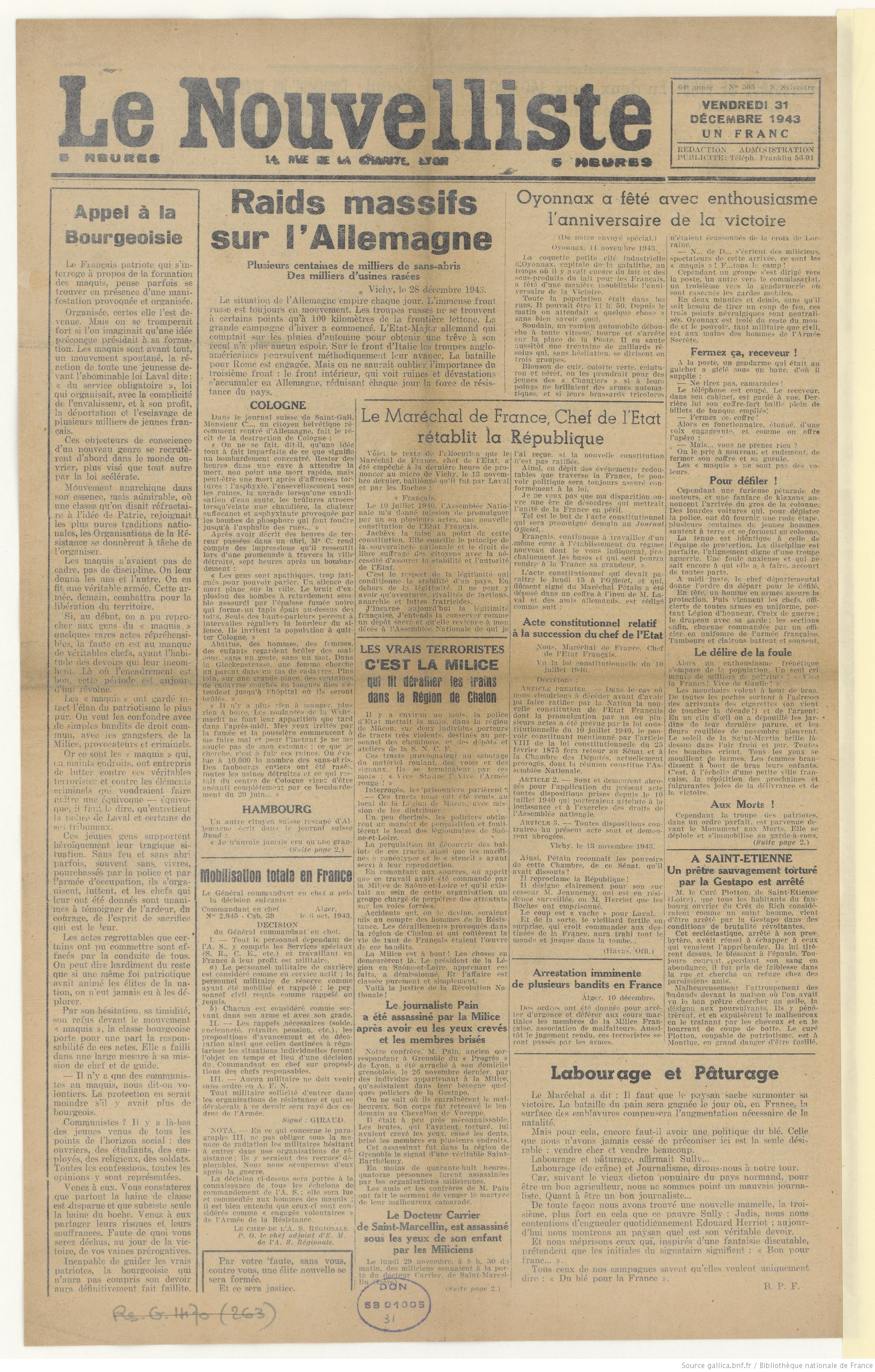 Page 1 de l'édition fictive du Nouvelliste de Lyon publiée et distribuée par les résistants lyonnais pour remplacer l'édition officielle.